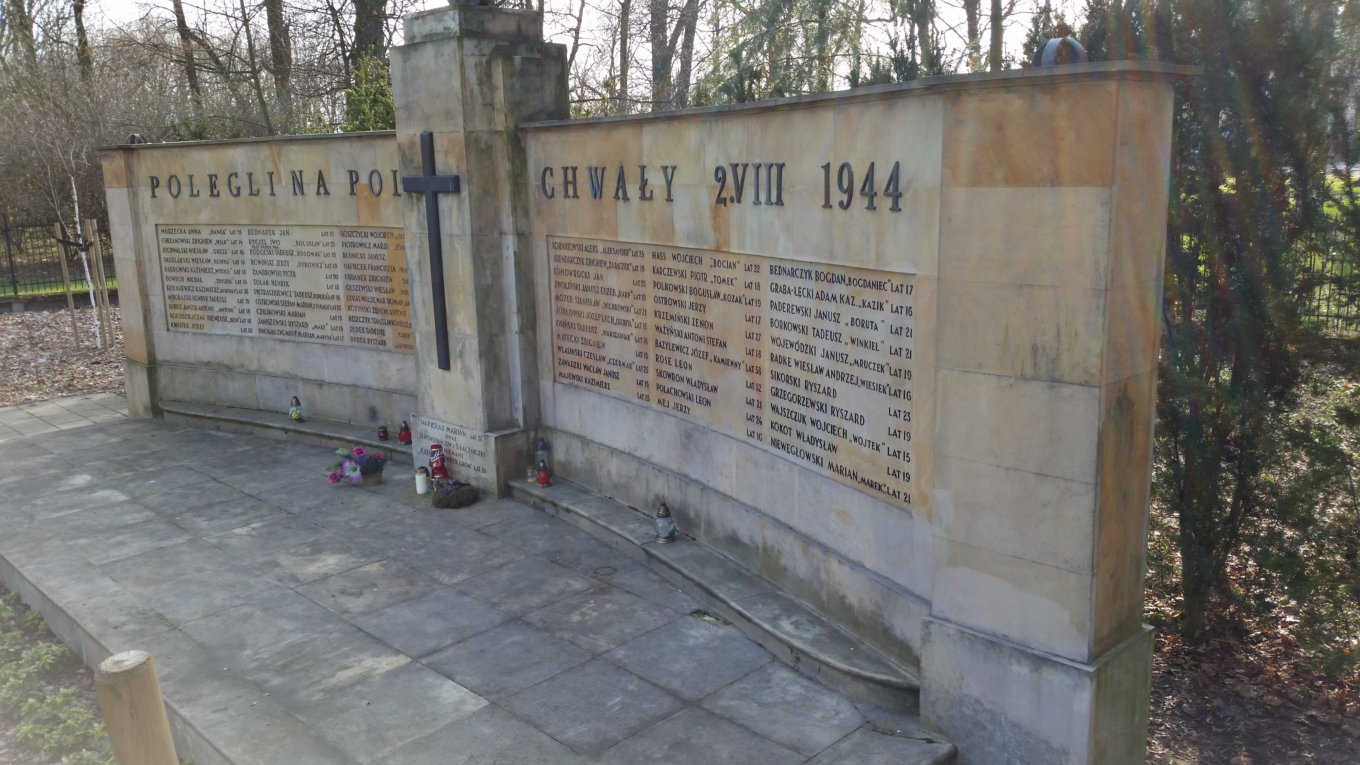 Pomnik Żołnierzy Armii Krajowej z IV Oddziału Ochota, walczących w Powstaniu Warszawskim, poległych 2 sierpnia 1944